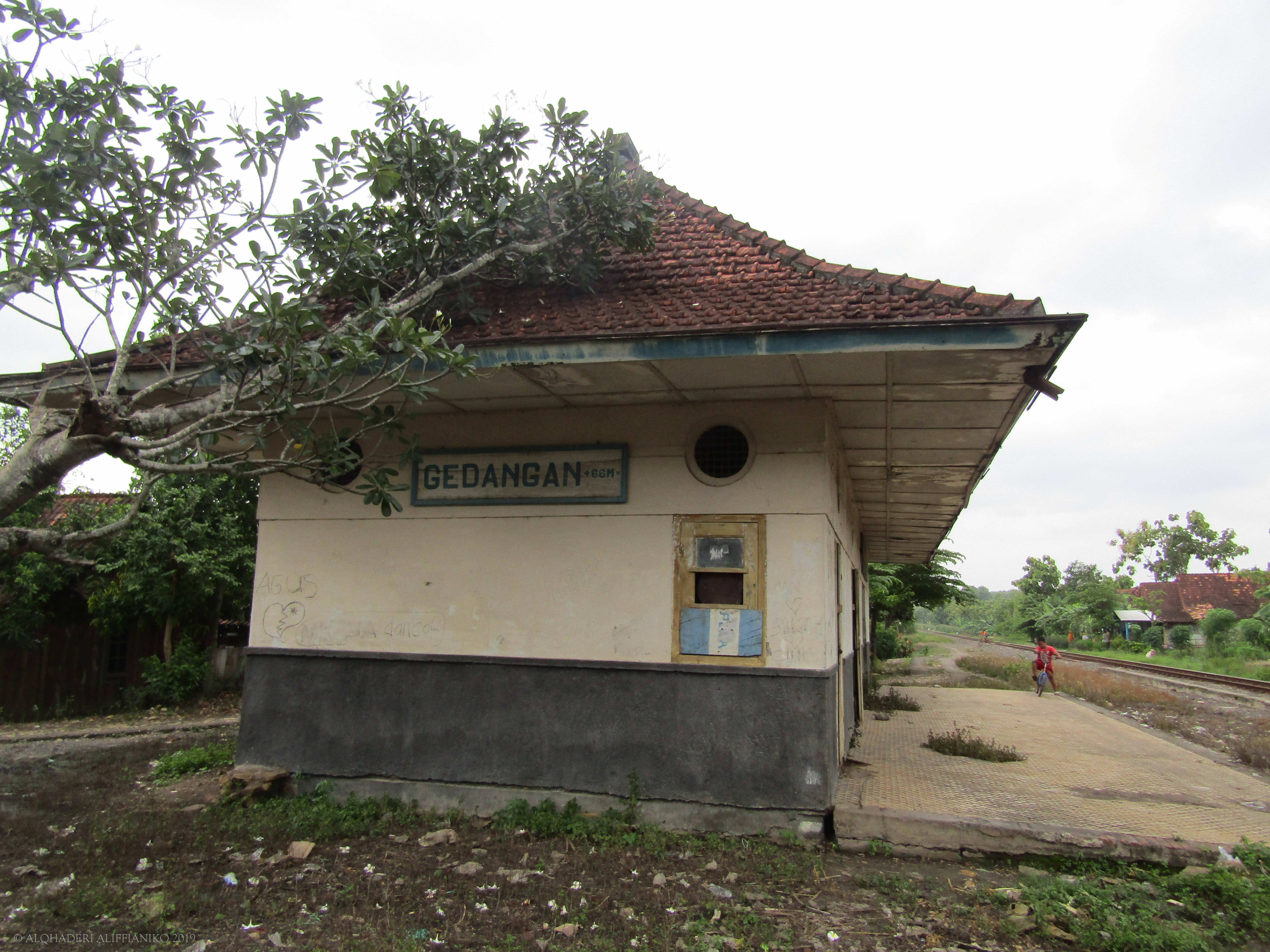 Tampak samping eks-Stasiun Grobogan, 2019